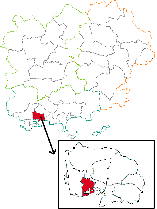 Situation du canton dans la département du Var (83), France